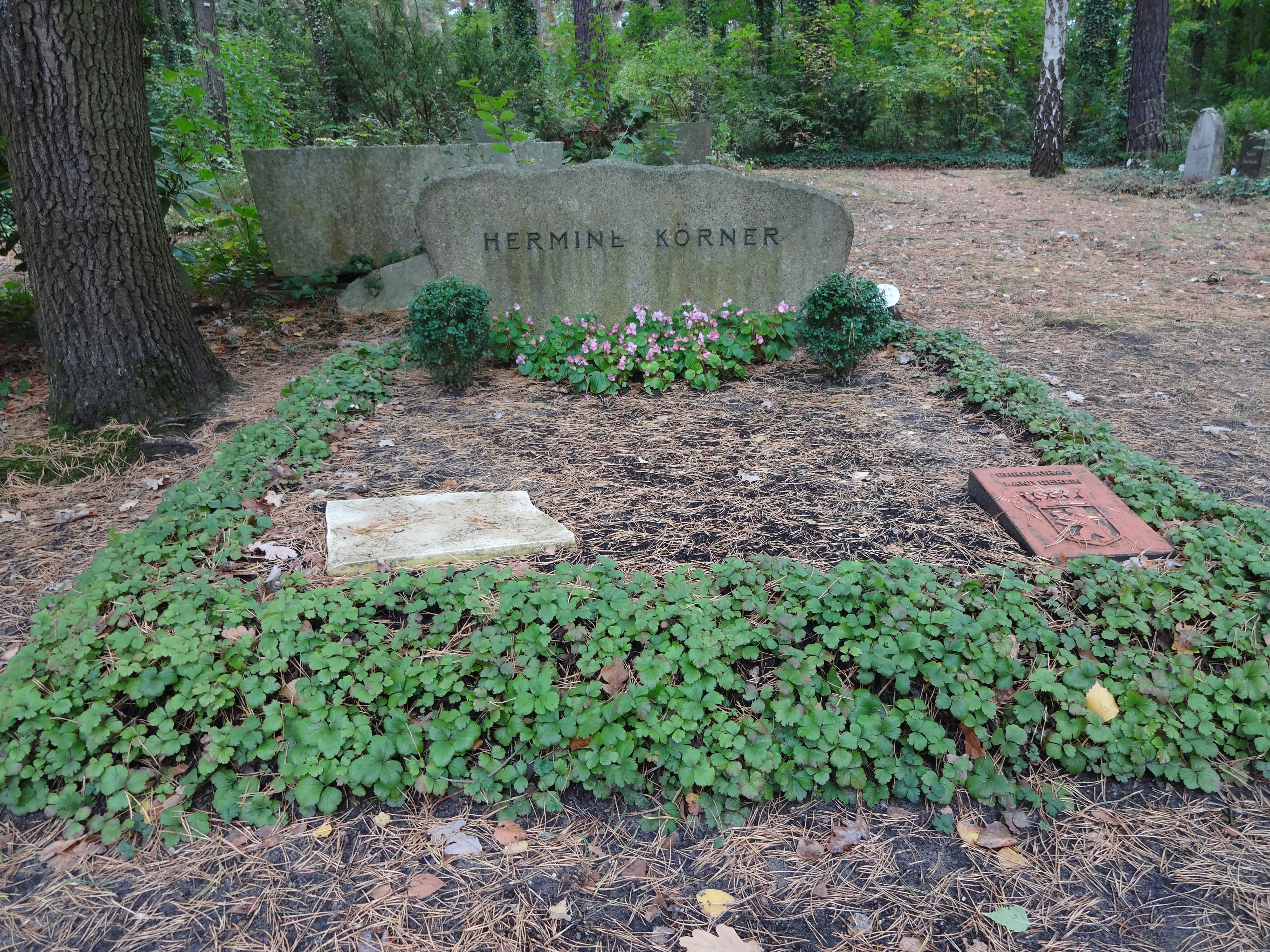 Grab von Hermine Körner auf dem Waldfriedhof Zehlendorf; Ehrengrab